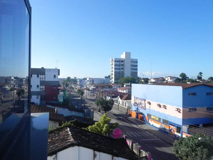 O centro comercial de Alagoinhas se industrializou muito nos últimos anos com a chegada de indústrias.